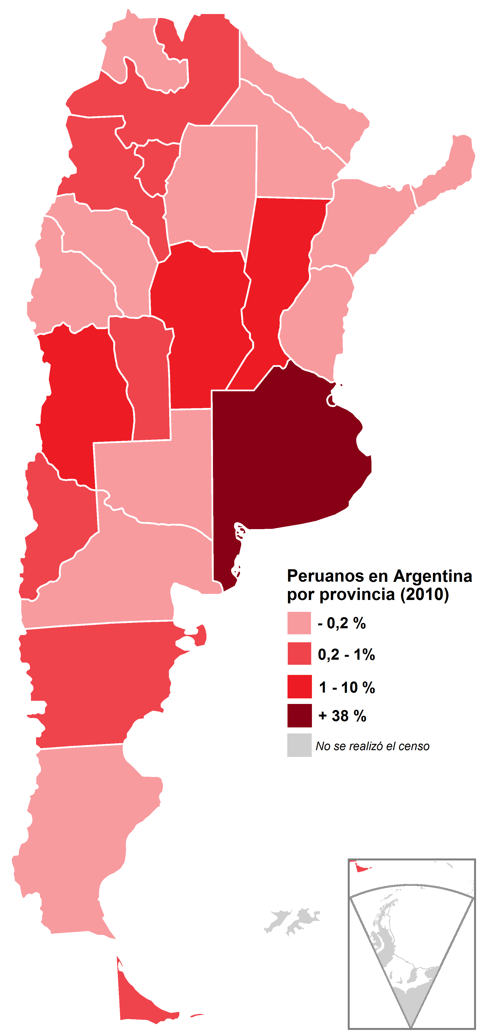 República Argentina por provincia. Población nacida en Perú, en porcentaje. Año 2010. Fuente: Censo 2010 - INDEC.